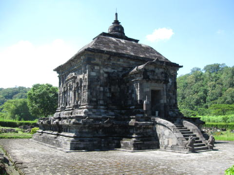 Candi Banyunibo 田圃に囲まれた遺跡。